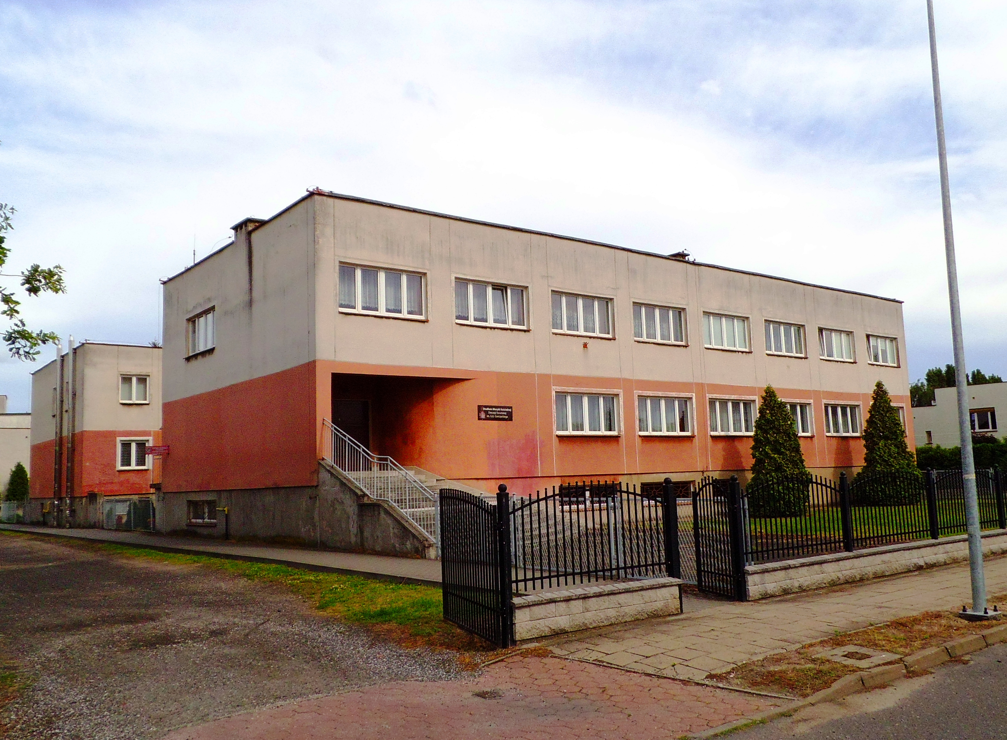 Studium Muzyki Kościelnej Diecezji Toruńskiej w Toruniu